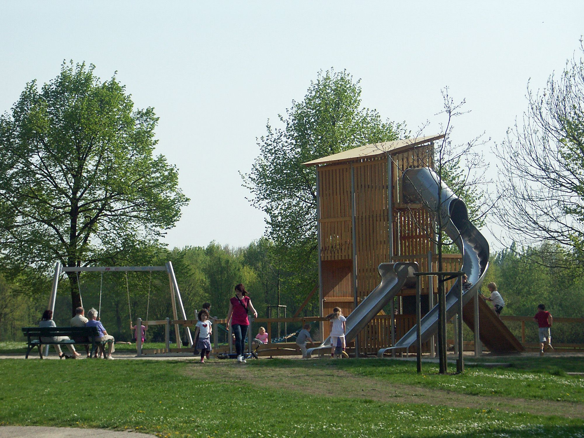 Ein Spielplatz im Erholungspark Lößnig-Dölitz